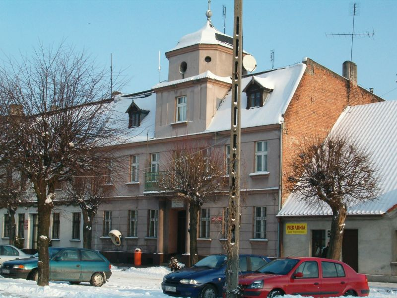 Polska, Ratusz Miejski z przełomu lat 20 i 30 XX wieku, znajdujący się w Dobrzycy, powiat pleszewski, woj. wielkopolskie przy Rynku.